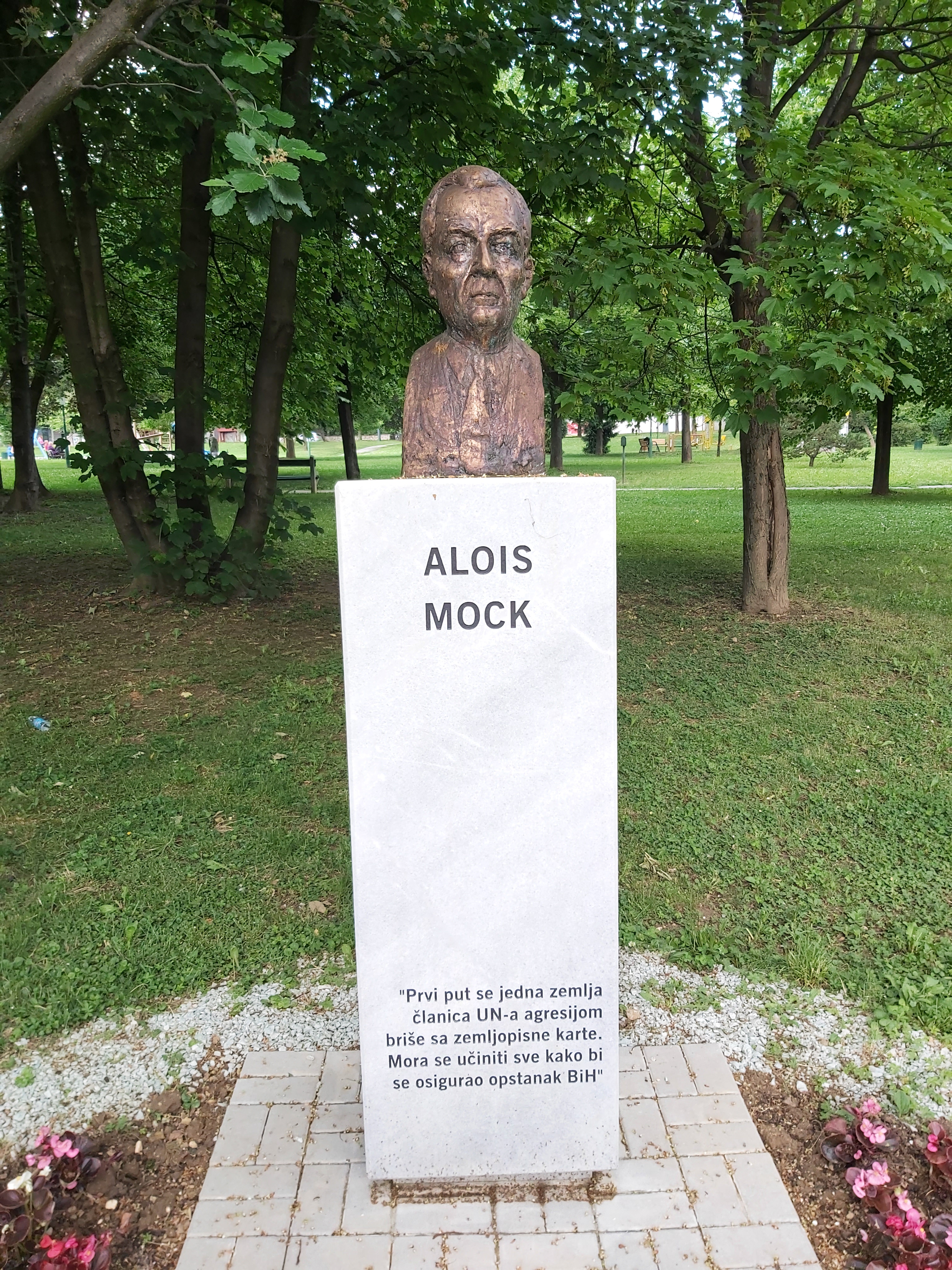 Bista Aloisa Mocka u Sarajevu